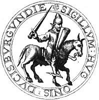 Hugo III. Burgundský